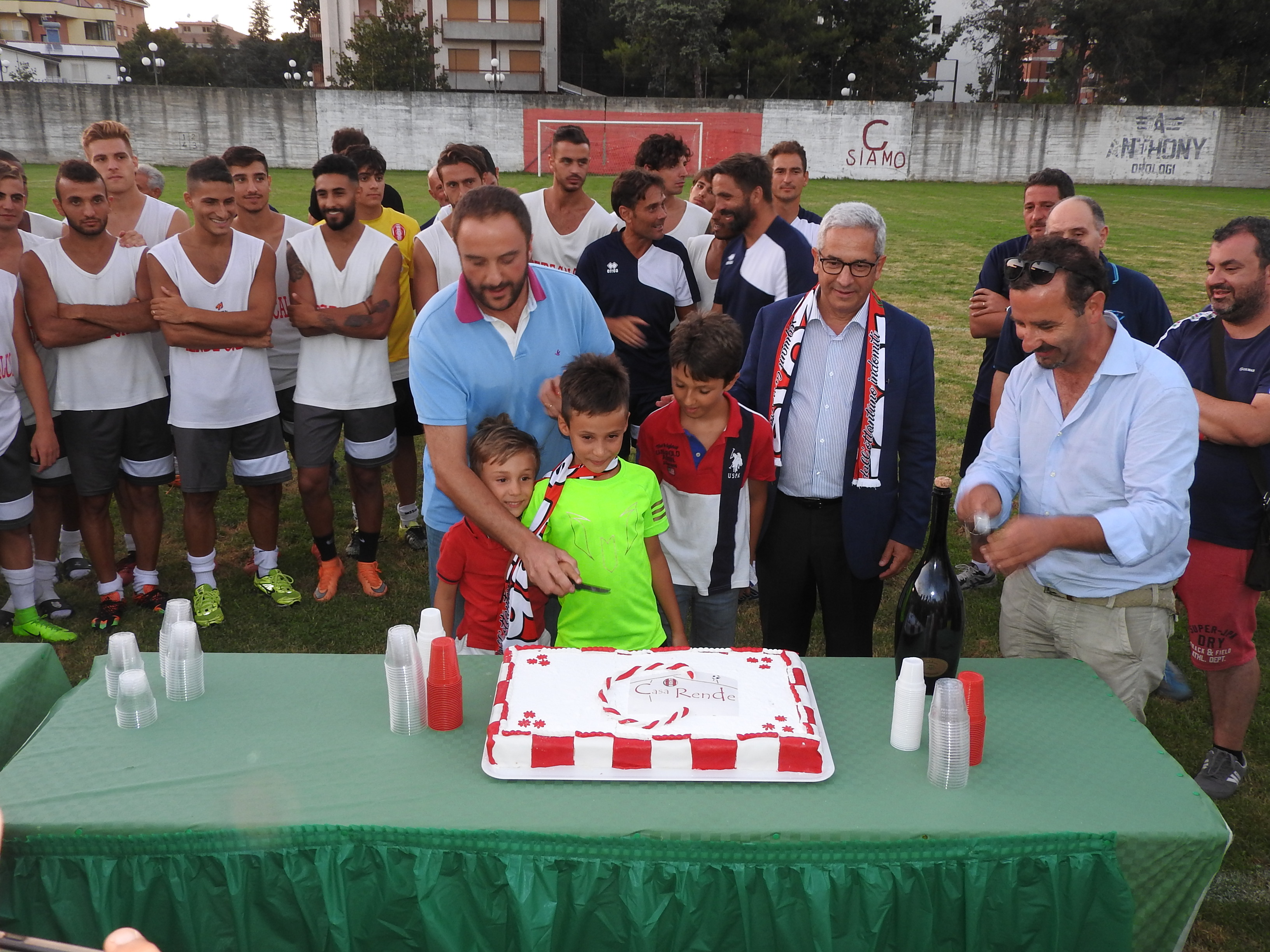 Festeggiamenti per il ripescaggio in Serie C 2017-18 del Rende Calcio